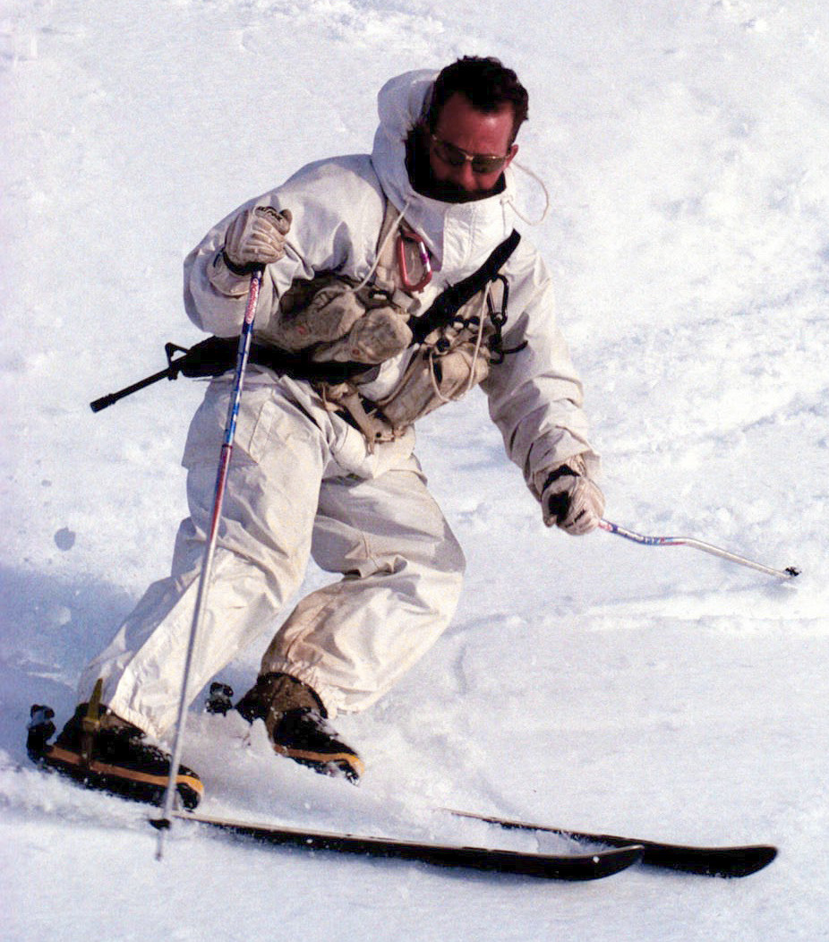 February 28, 2004. On warm days such as these, the Alpine Unit, the snow clearing and rescue unit of the Hermon, practices skiing, climbing, shooting, and rescue drills in snow covered regions. The unit is comprised of reserve soldiers who were formerly part of other elite units and who volunteered to serve. בימים חמימים אלו, לאחר סופת שלגים בחרמון, מקיימת יחידת האלפיניסטים, יחידת פינוי השלגים והחילוץ בחרמון, אימוני גלישה, טיפוס, ירי וחילוץ ברמות המושלגות. היחידה מורכבת מאנשי מילואים מתנדבים, יוצאי סיירות.